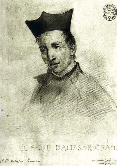 Retrato de Baltasar Gracián por Valentín Carderera